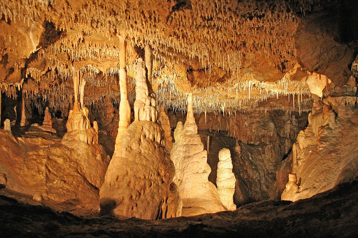 Jeskyně Balcarka u Ostrova u Macochy v Moravském Krasu